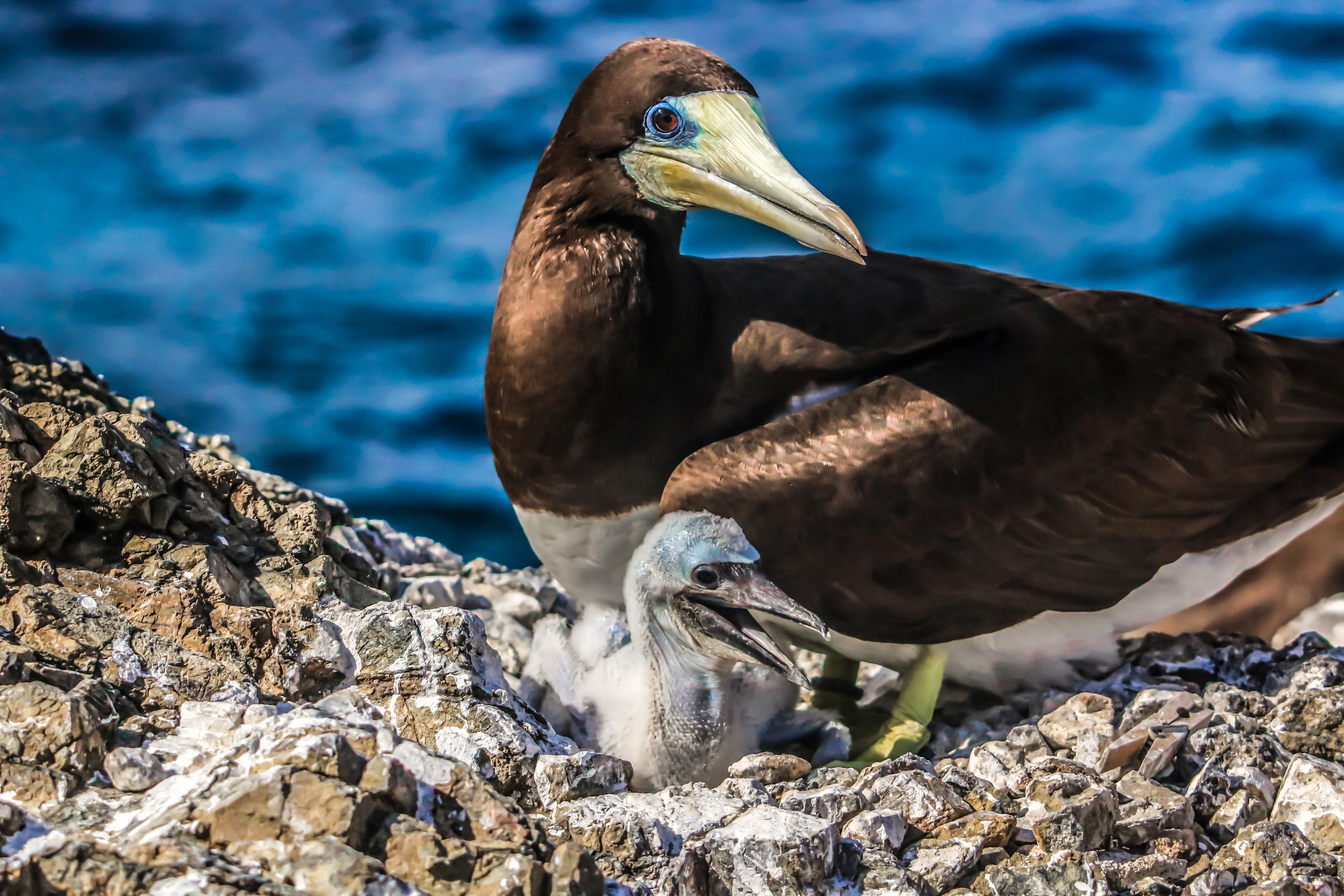 Atoba com filhote no Arquipélago de São Pedro e São Paulo, Pernambuco, Brasil